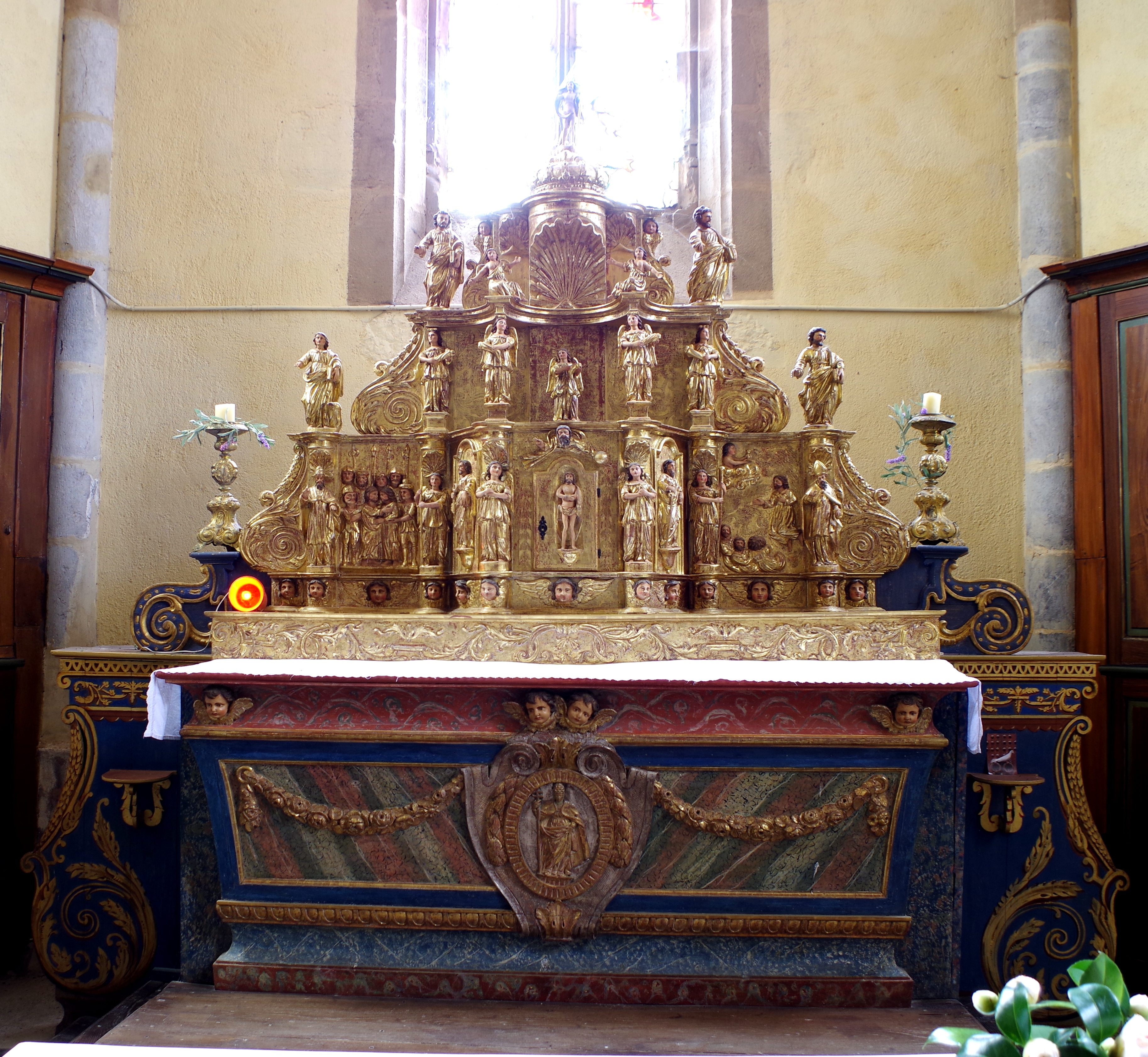 Maitre-autel, tabernacle et retable du XVIIIe